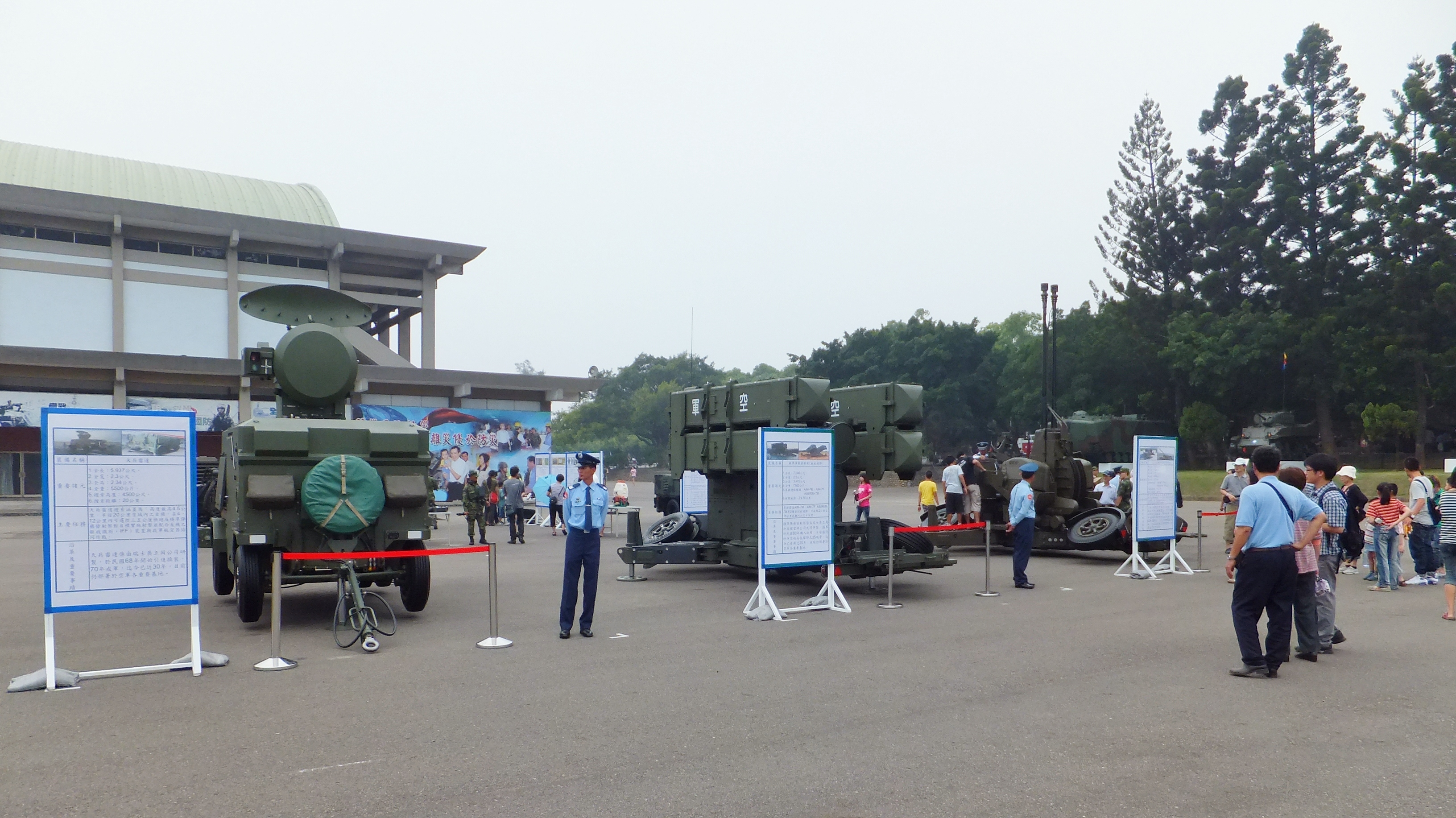 中華民國空軍由天兵射控雷達、奧立崗35快砲與麻雀飛彈發射器組成之天兵防空系統，展示於2011年成功嶺營區公開活動。